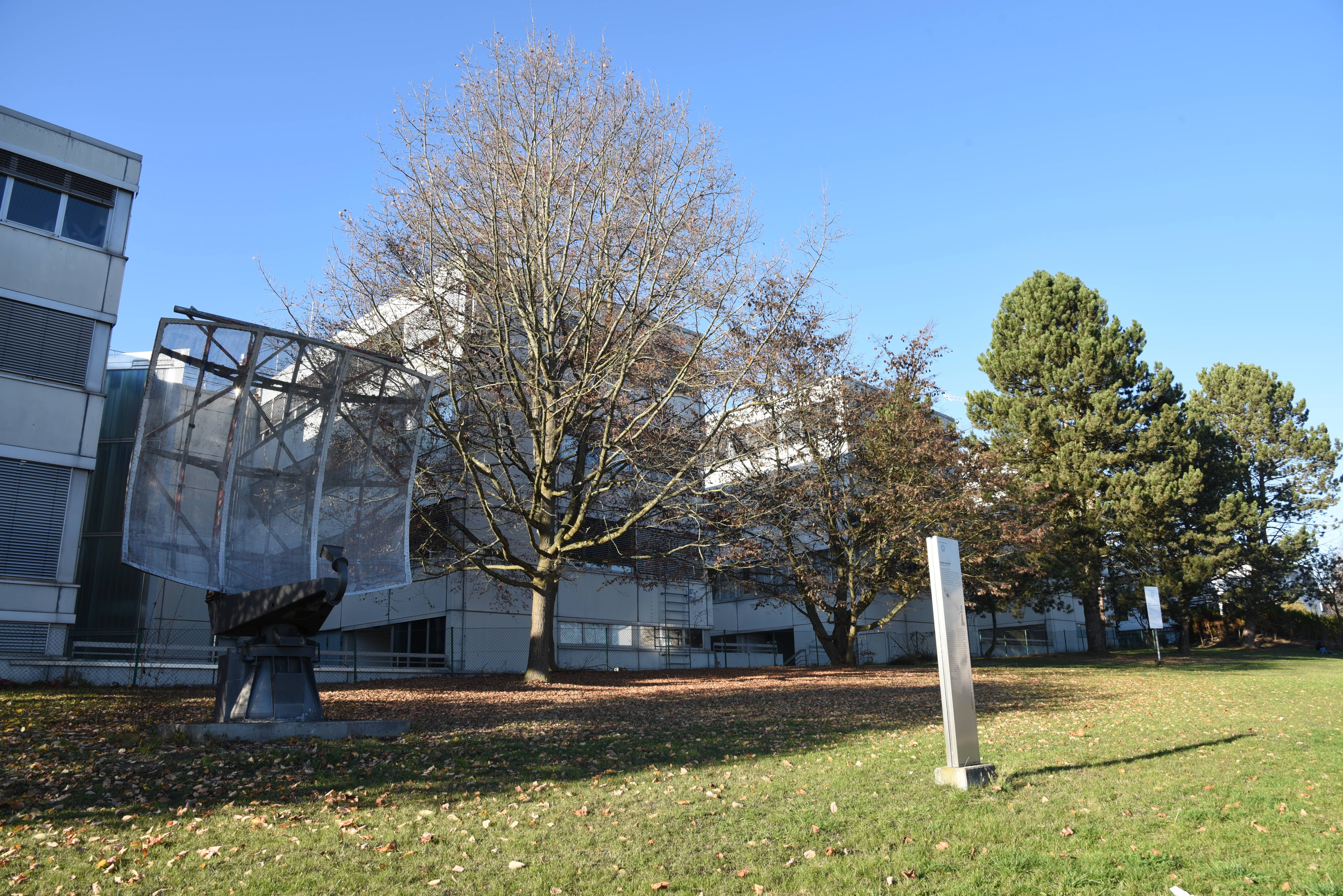 Der Campus Eberhard-Finckh Straße in Böfingen